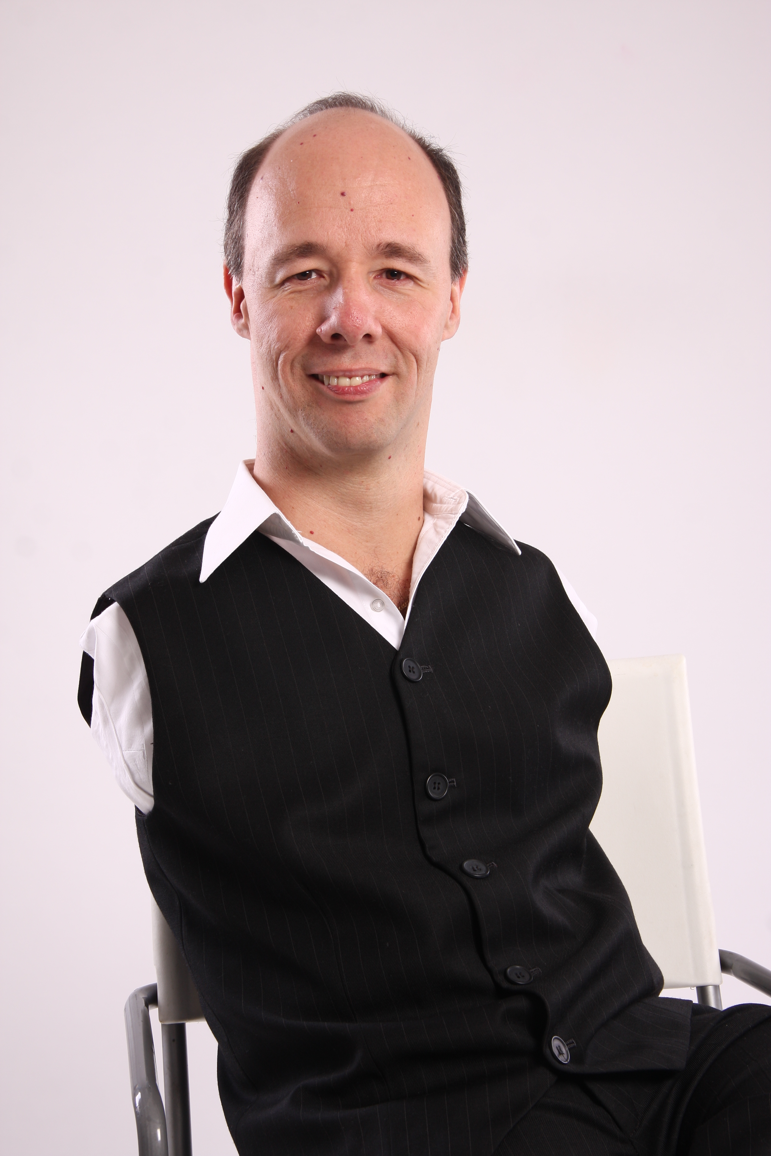 Imparte conferencias de motivación, vivenciales, valores, ética, proyectos para iniciar un negocio, reflexivas, testimoniales y religiosas.